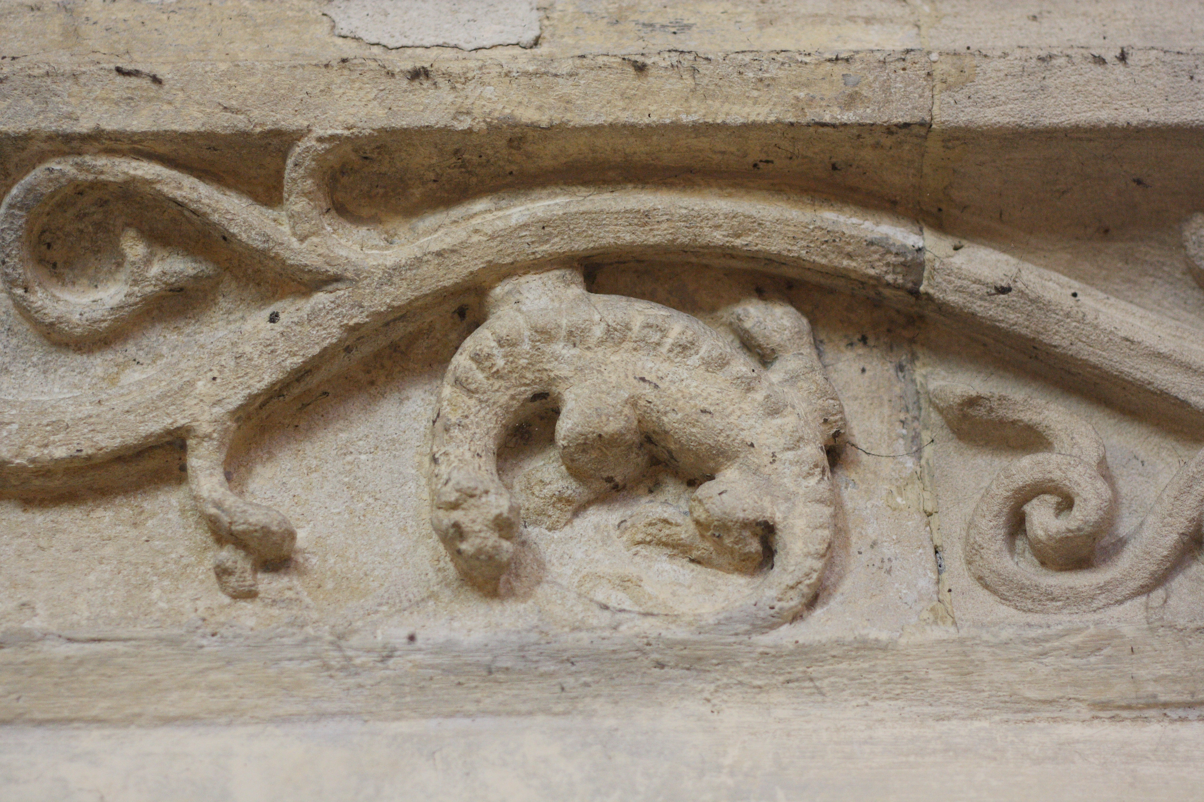 katholische Pfarrkirche Saint-Justin in Louvres, Detail eines Frieses im Innern